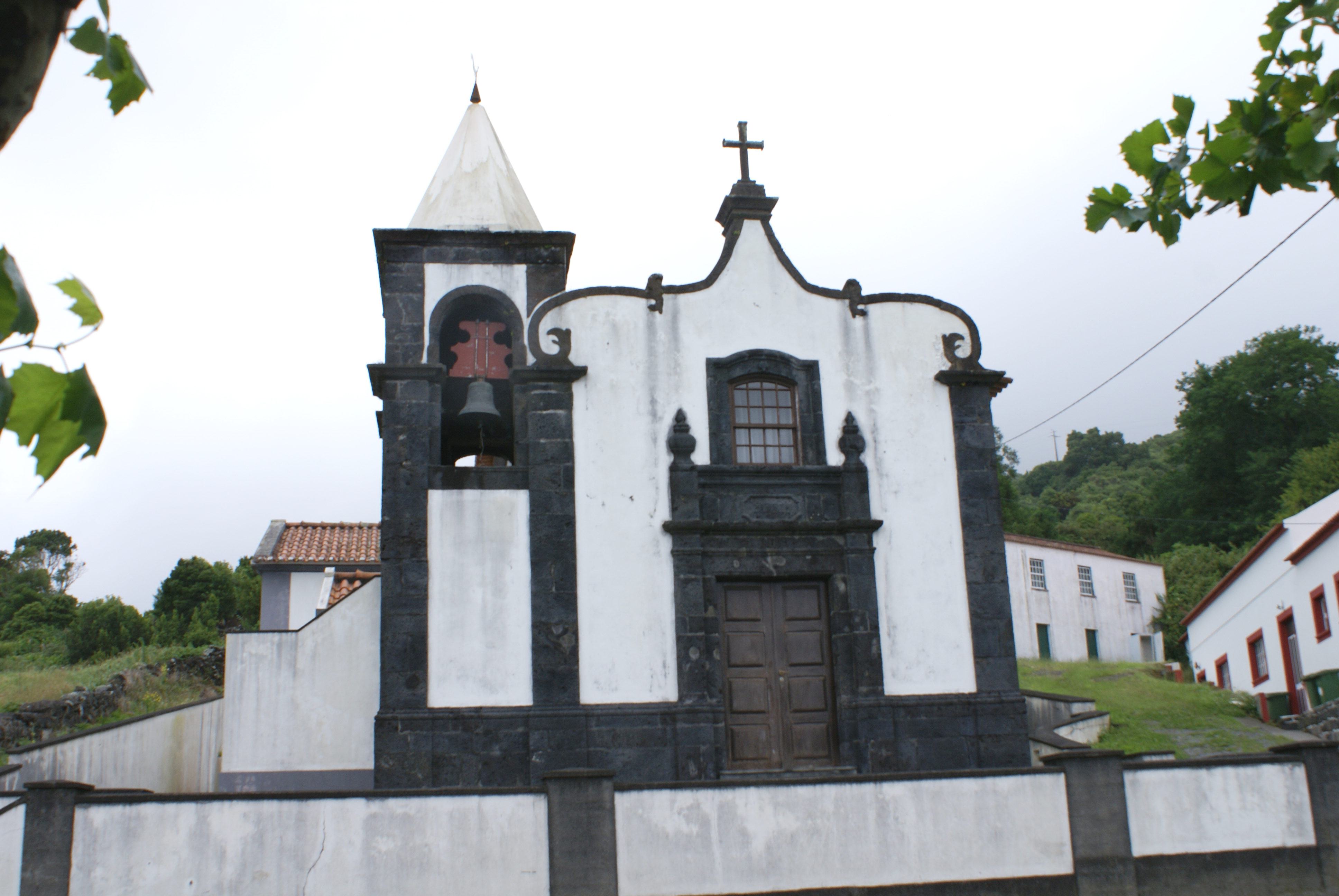 Ermida de Nossa Senhora do Socorro, Biscoitos, Calheta, ilha de São Jorge, Açores